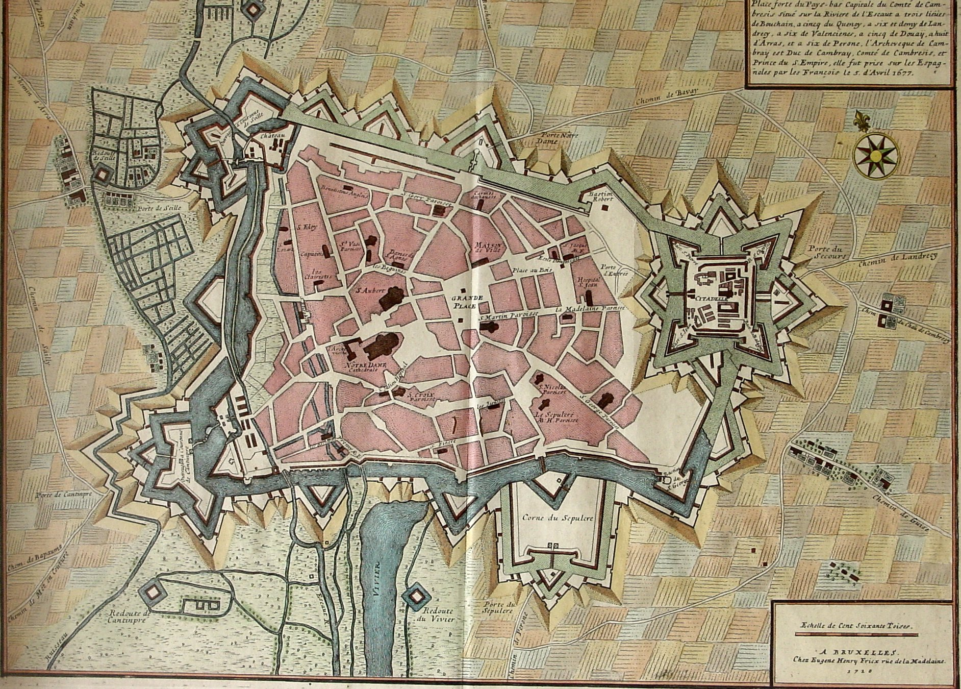 Plan de Cambrai fait en 1710 chez Eugène Henry Friex rue de la Madelaine à Bruxelles